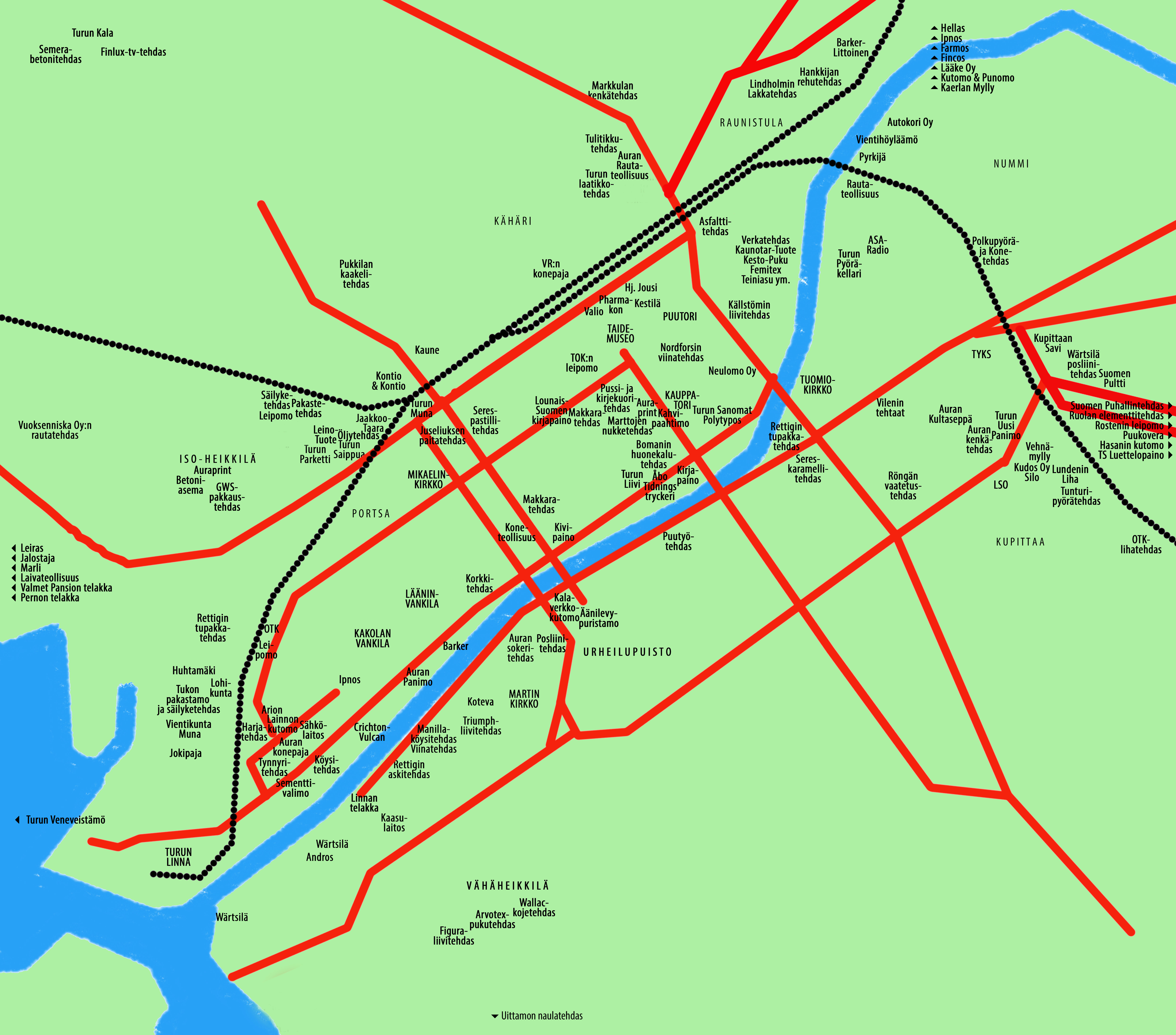 Summittainen kartta Turun suurimmista teollisista työnantajista 1900-luvulla. Tarkan yksittäisen lähteen puutteessa koottu satunnaisista lähteistä ja oman tiedon pohjalta ja on siksi puutteellinen.